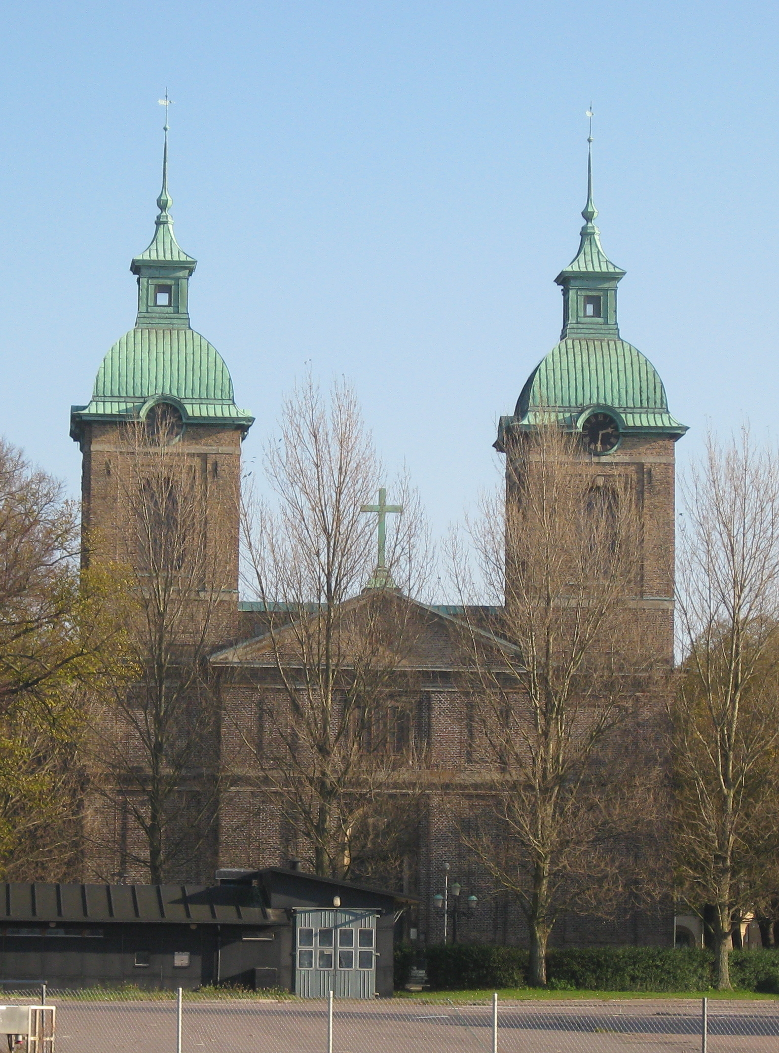 Sofia Albertina kyrka i Landskrona